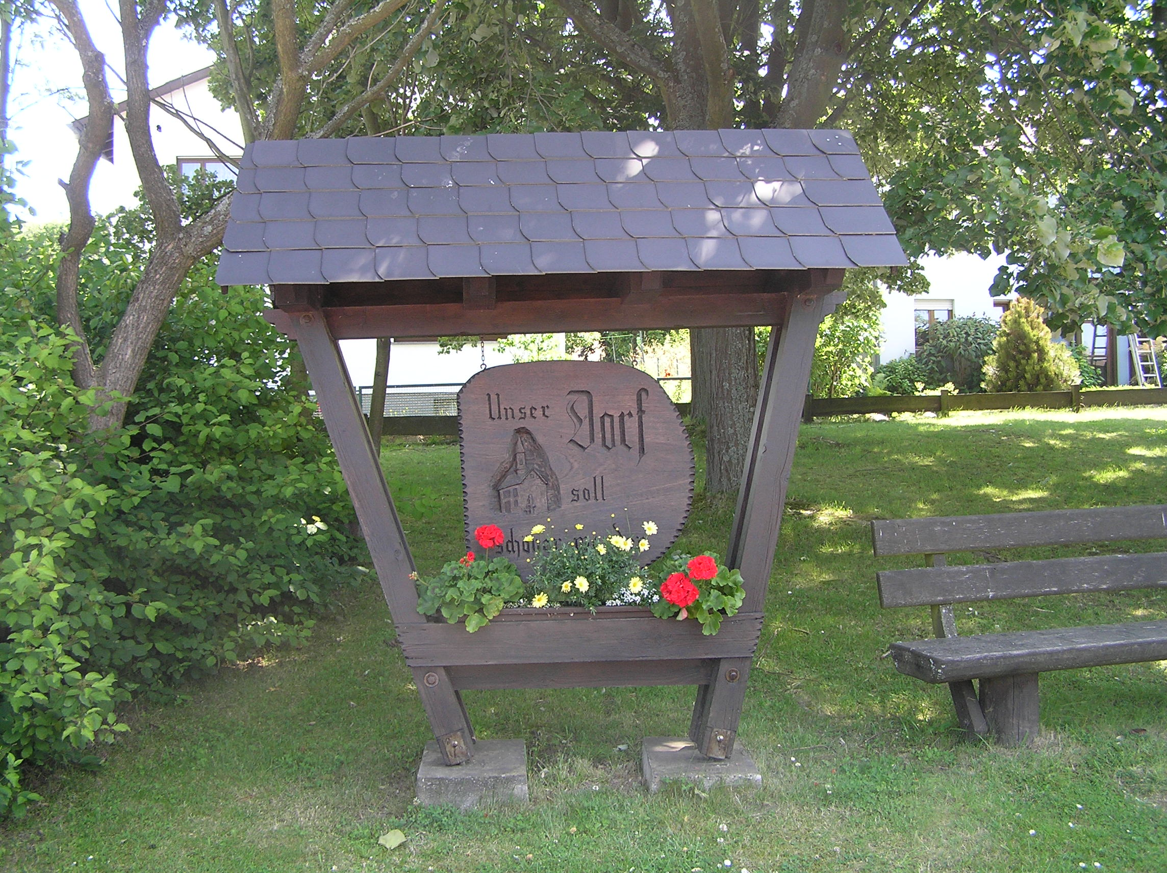 Tafel "Unser Dorf soll schöner werden" gegenüber dem Dorfgemeinschaftshaus von Lenzhahn, Idstein